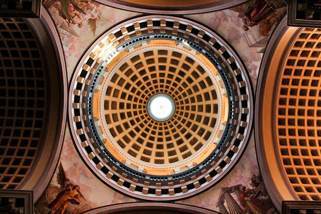 Esta é a imagem interna da cúpula da basílica menor de Nossa Senhora da Penha na Cidade do Recife, estado de Pernambuco - Brasil. Foto feita por Francisco Miguel de Sousa Dionisio, @fr.dionizio.